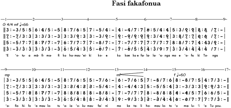 Tonga national anthem in tuʻungafasi notation